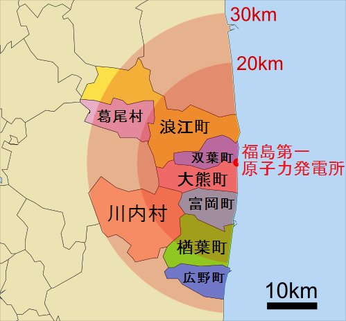 福島第一原発事故に伴う避難区域と、双葉郡にある自治体の地図